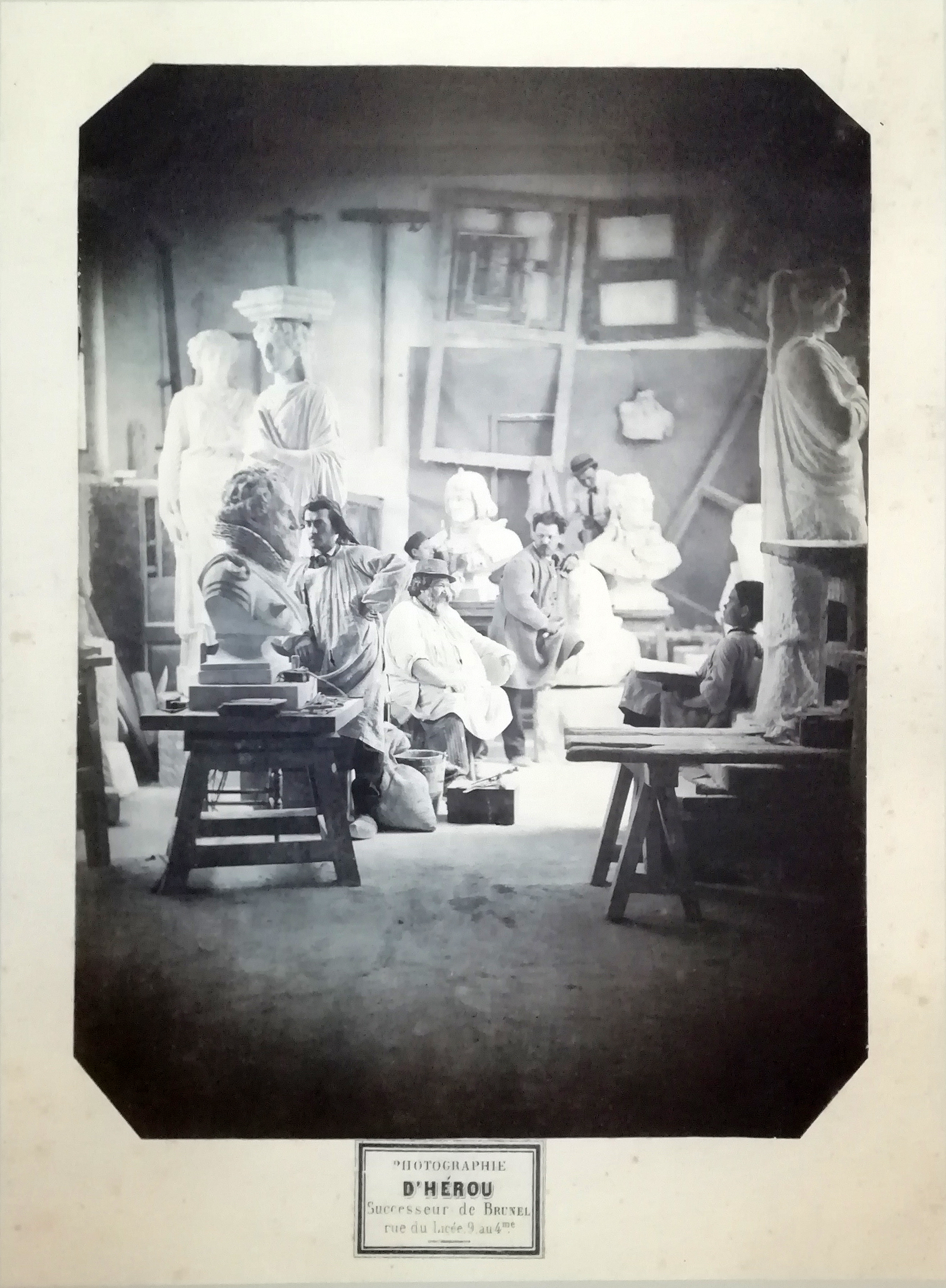 Charles D'Hérou, L'atelier du sculpteur Aimé Irvoy, photographie, après 1868, Coll. Musée dauphinois, Grenoble (inv. SN2010.7.2082). Charles D'Hérou est photographe à Grenoble, au 9 rue du Lycée, des dernières années 1860 aux premières années 1880. Sur la photo on voit trois des 10 bustes commandés pour orner la nouvelle préfecture de l'Isère: les bustes du Chevalier Bayard (par Aimé Irvoy), du duc de Lesdiguières (par Aimé Irvoy) et de Mounier (par Hippolyte Rubin). Informations tirées de la plaquette de l'Exposition temporaire "Grenoble et ses artistes au XIXe siècle" au Musée de Grenoble, où le cliché était tiré en grand format à couvrir un mur de passage entre deux salles du musée.